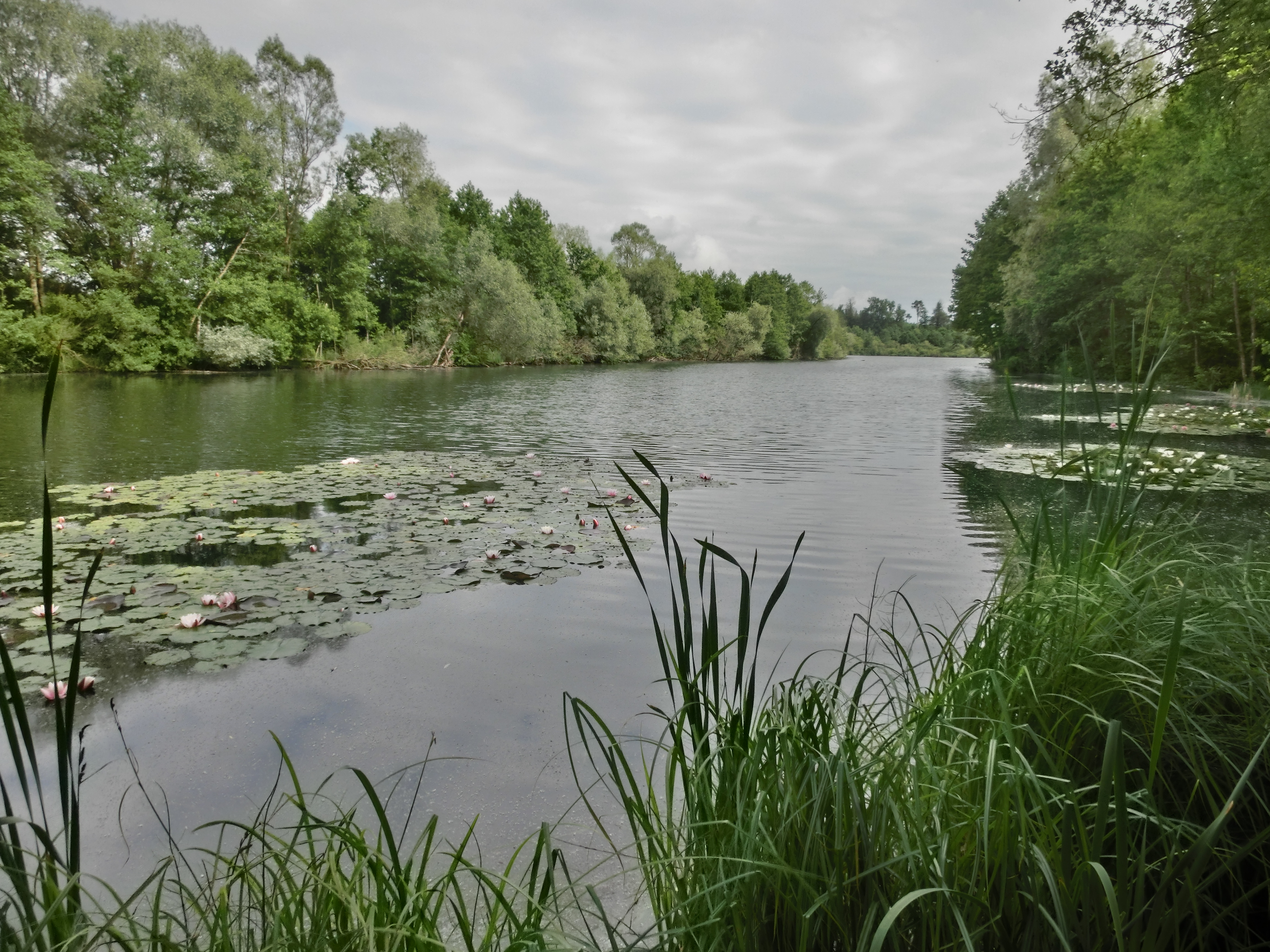 Deutschland (D) - Baden-Württemberg (BW) - Landkreis Konstanz (KN) - Gemeinde Mühlingen - Ortsteil Schwackenreute: Naturschutzgebiet "Schwackenreuter Baggerseen - Rübelisbach"